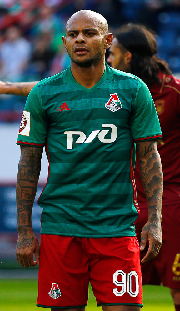 «Локомотив» - «Рубин»